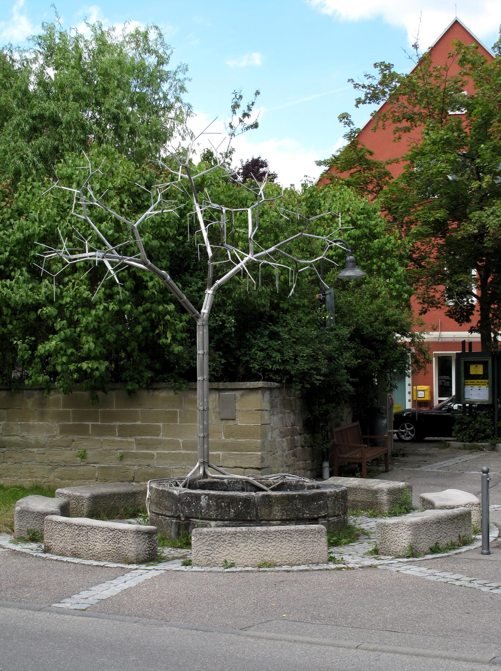 Frei Otto, Christian-Wagner-Brunnen mit Edelstahlplastik, 1995, - Deutschland, Baden-Württemberg, Leonberg-Warmbronn, Bei der Wette/Planstraße